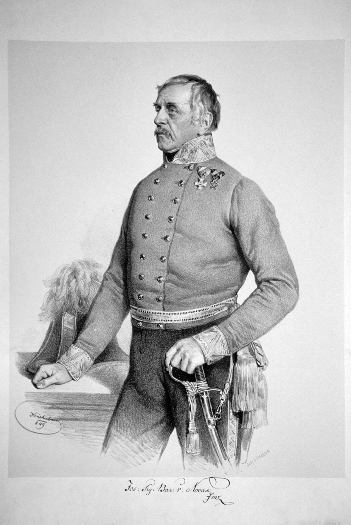 Siegmund Josef Freiherr von Novak (1774-1860), Feldmarschallleutnant, Ritter des Maria-Theresien Ordens. Lithographie von Josef Kriehuber, 1849